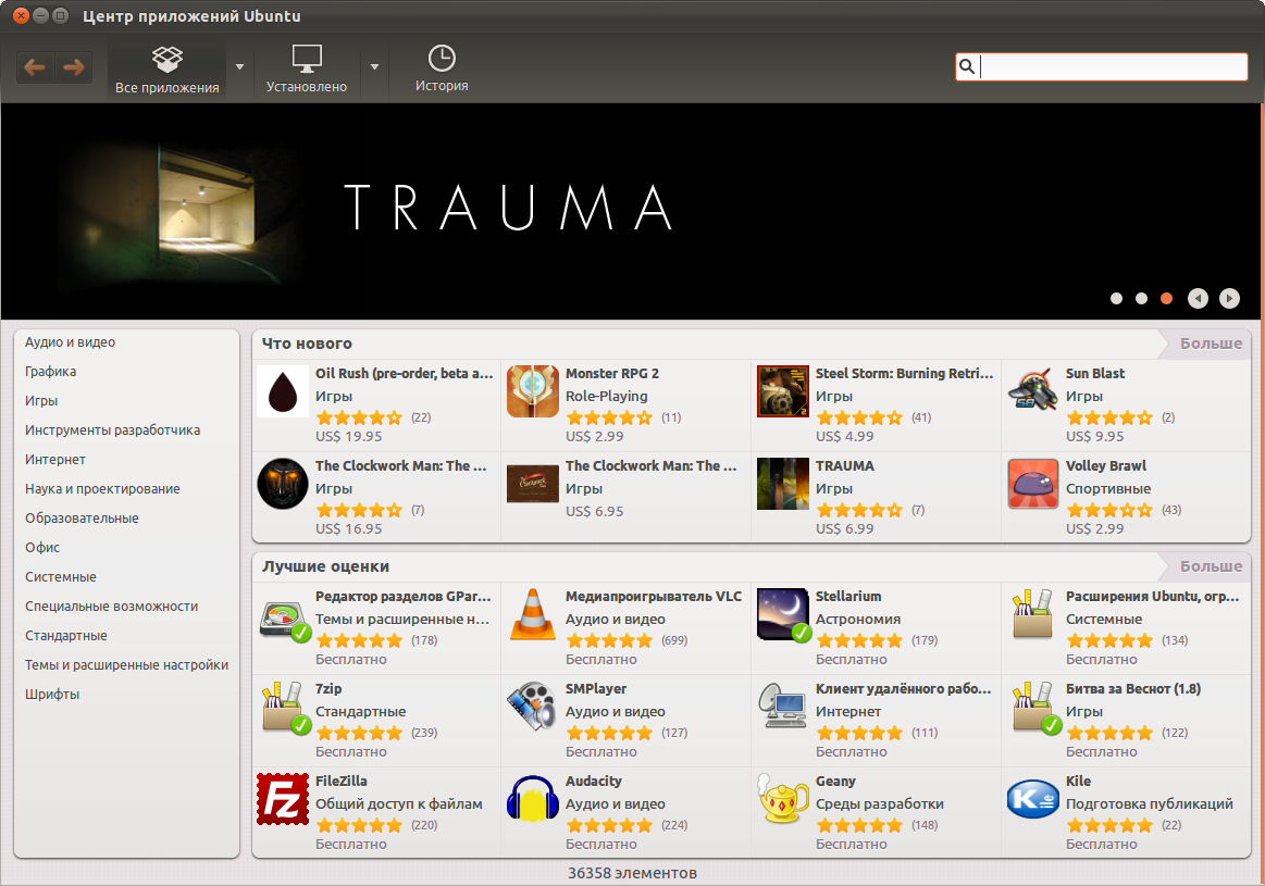 Центр приложений Ubuntu 5.0 в Ubuntu 11.10